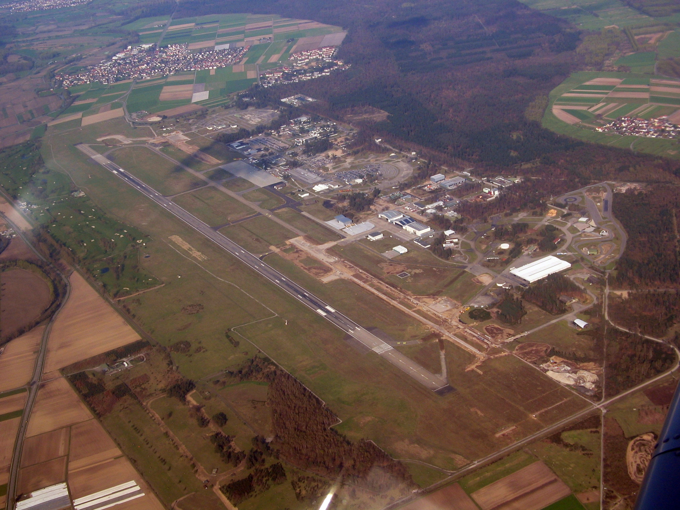 Flughafen Karlsruhe/Baden-Baden